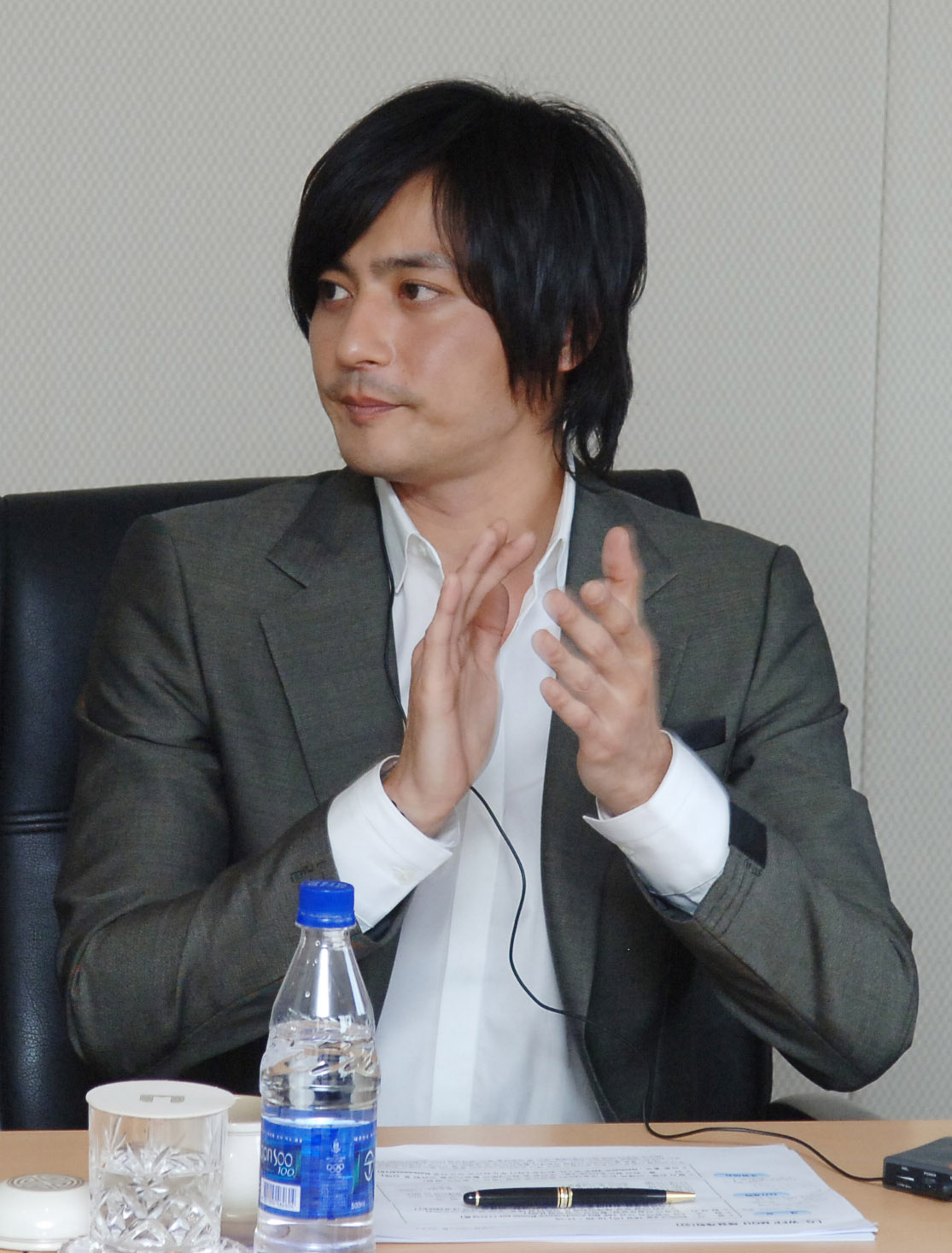 LG전자, 지구촌 기아구제 적극 동참